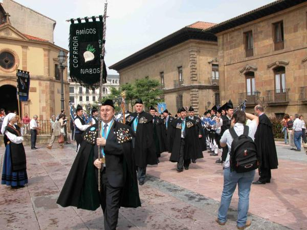 Desfile de la Confradía Amigos de los Nabos en Oviedo